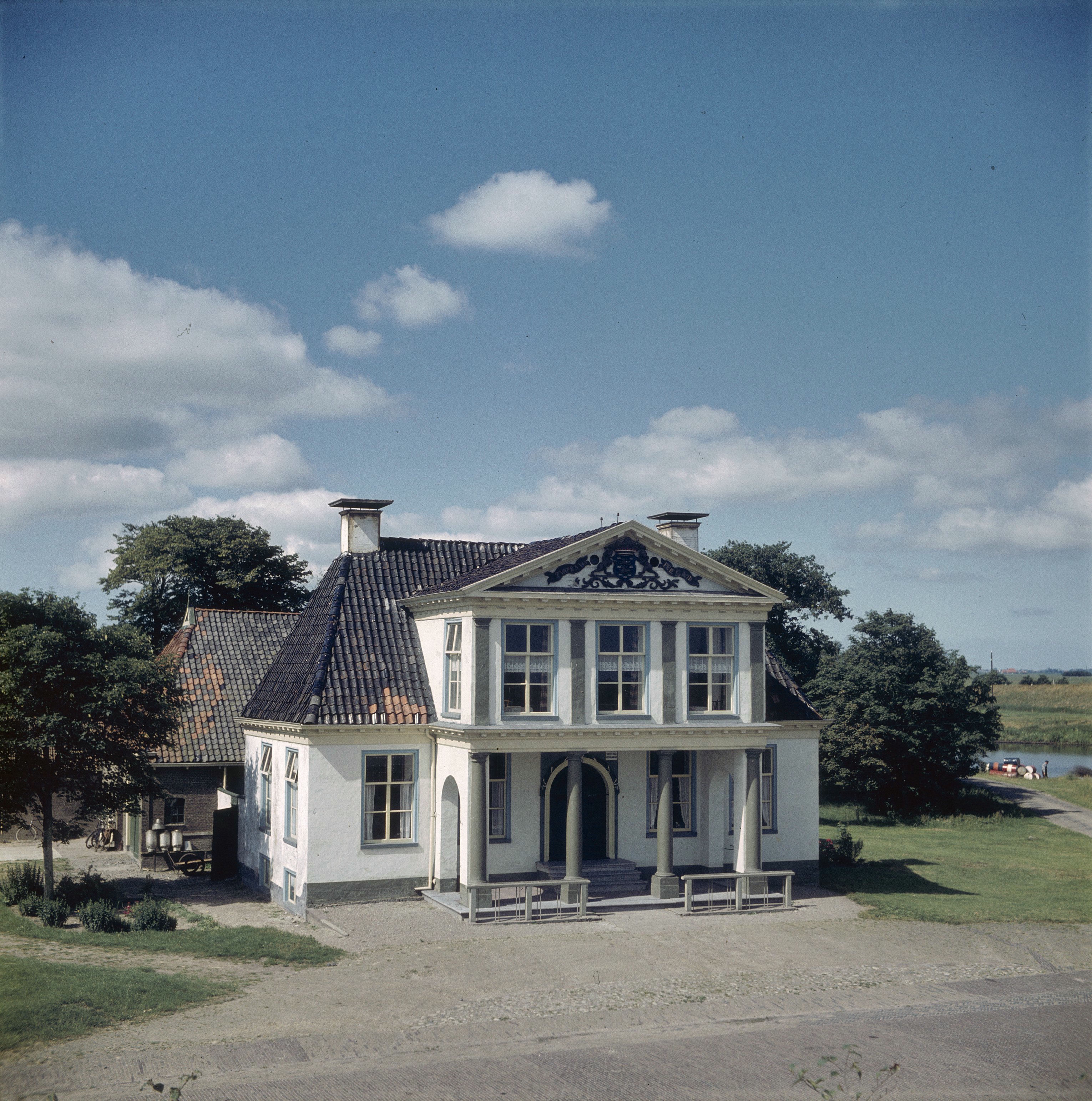 Spannenburg: Overzicht van de voorgevel met fronton en de rechter zijgevel